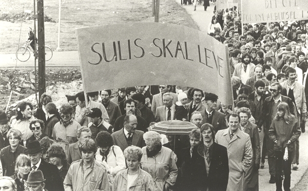 17. mai-toget i Sulitjelma. plakater med "Sulis skal leve" stort folketog med plakater om støtte for Sulissamfunnet. gitt av Nordlands Framtid. 1983 NM.F.008006-00001